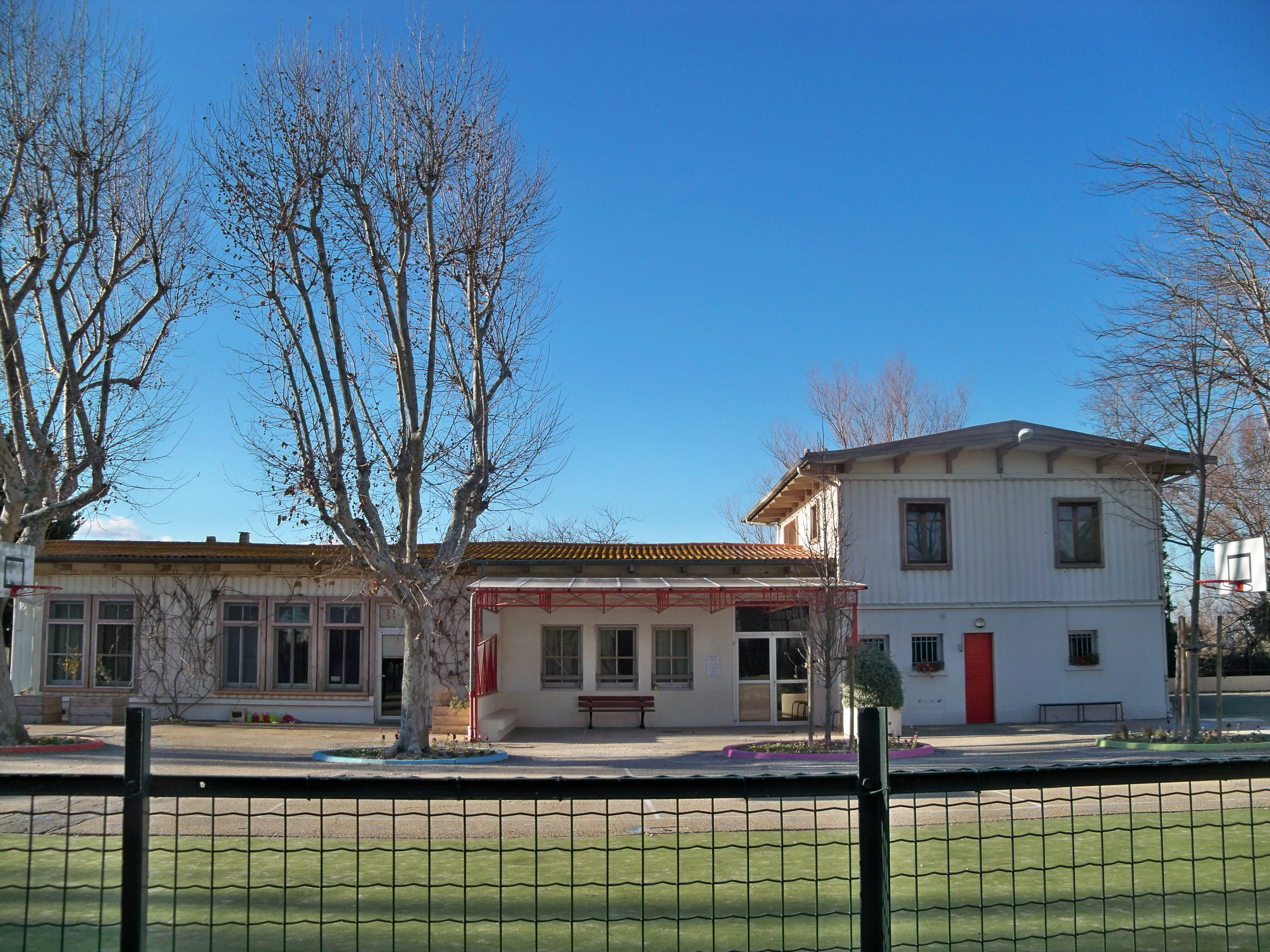 école de Gageron, Hameau d'Arles (13)